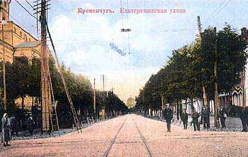 Кременчуг, пересечение улиц Екатерининская и Херсонская, 1900е годы